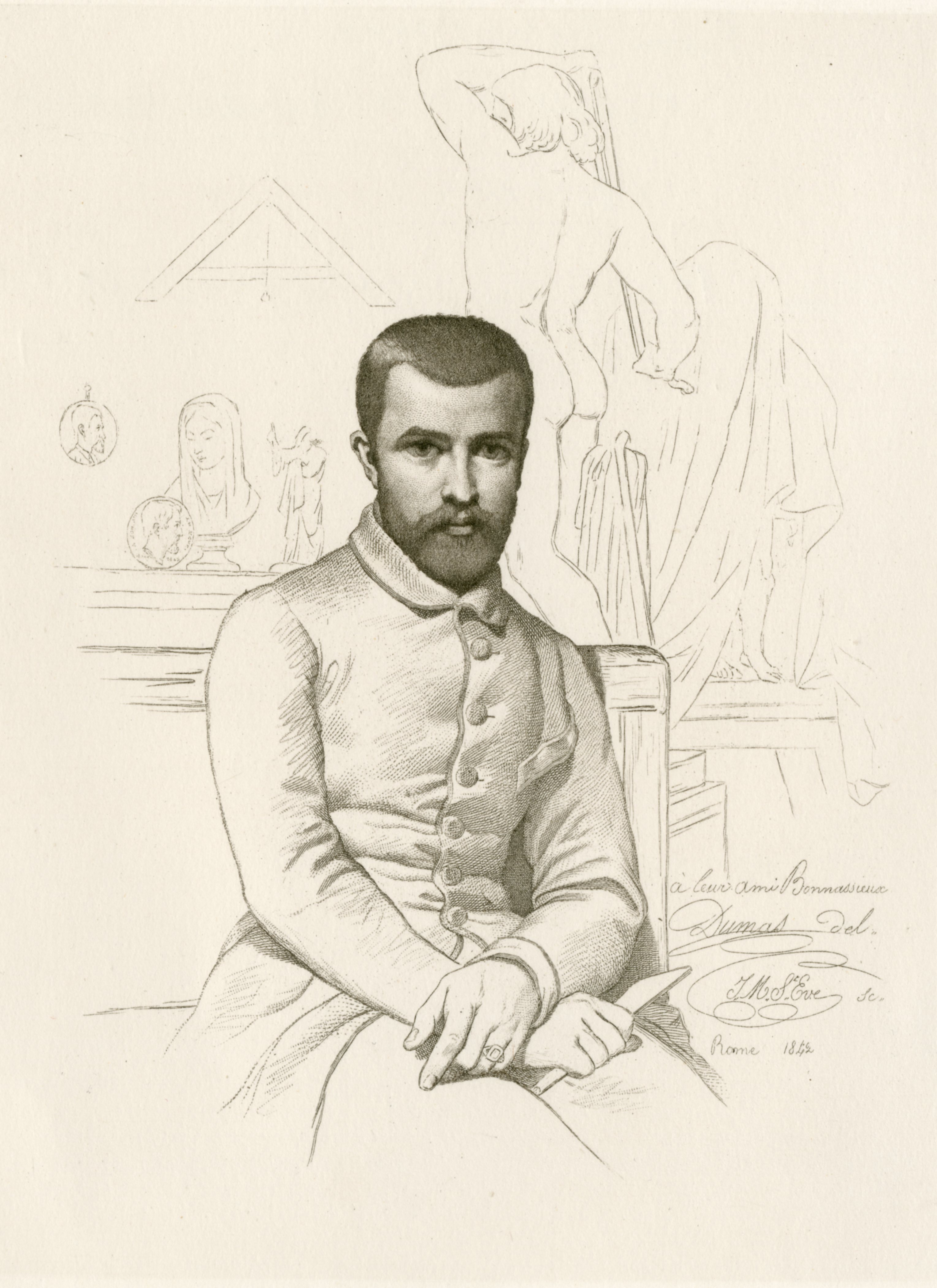 Reproduit dans l’ouvrage de Léo Armagnac sur Bonnassieux, Paris, 1897 Photo : EFW